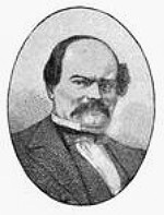 Gustaf Thomée, författare